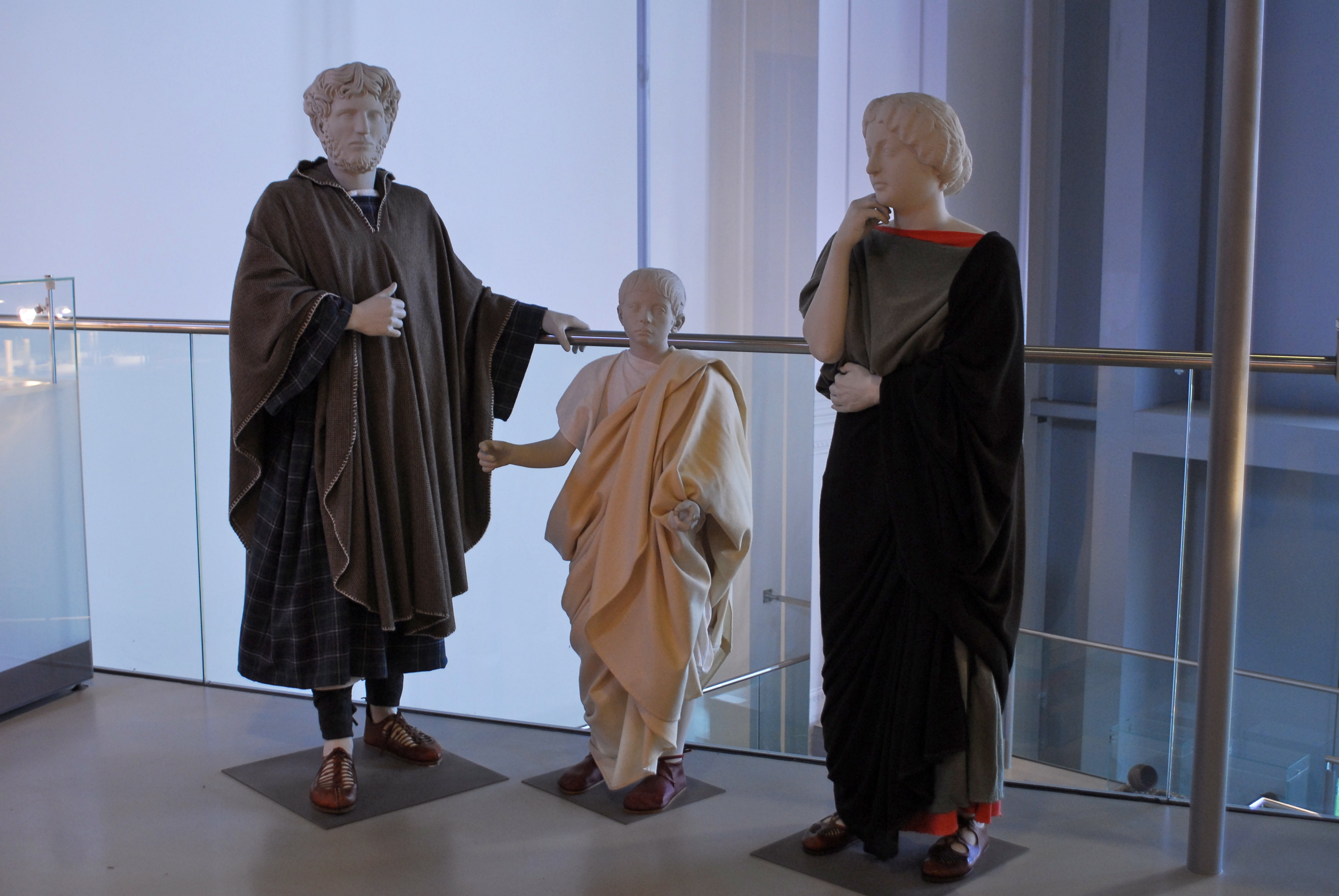 Römische Familie --- Colonia Ulpia Traiana, Xanten Niederrhein -- Roman family in the open air museum Xanten, Niederrhein